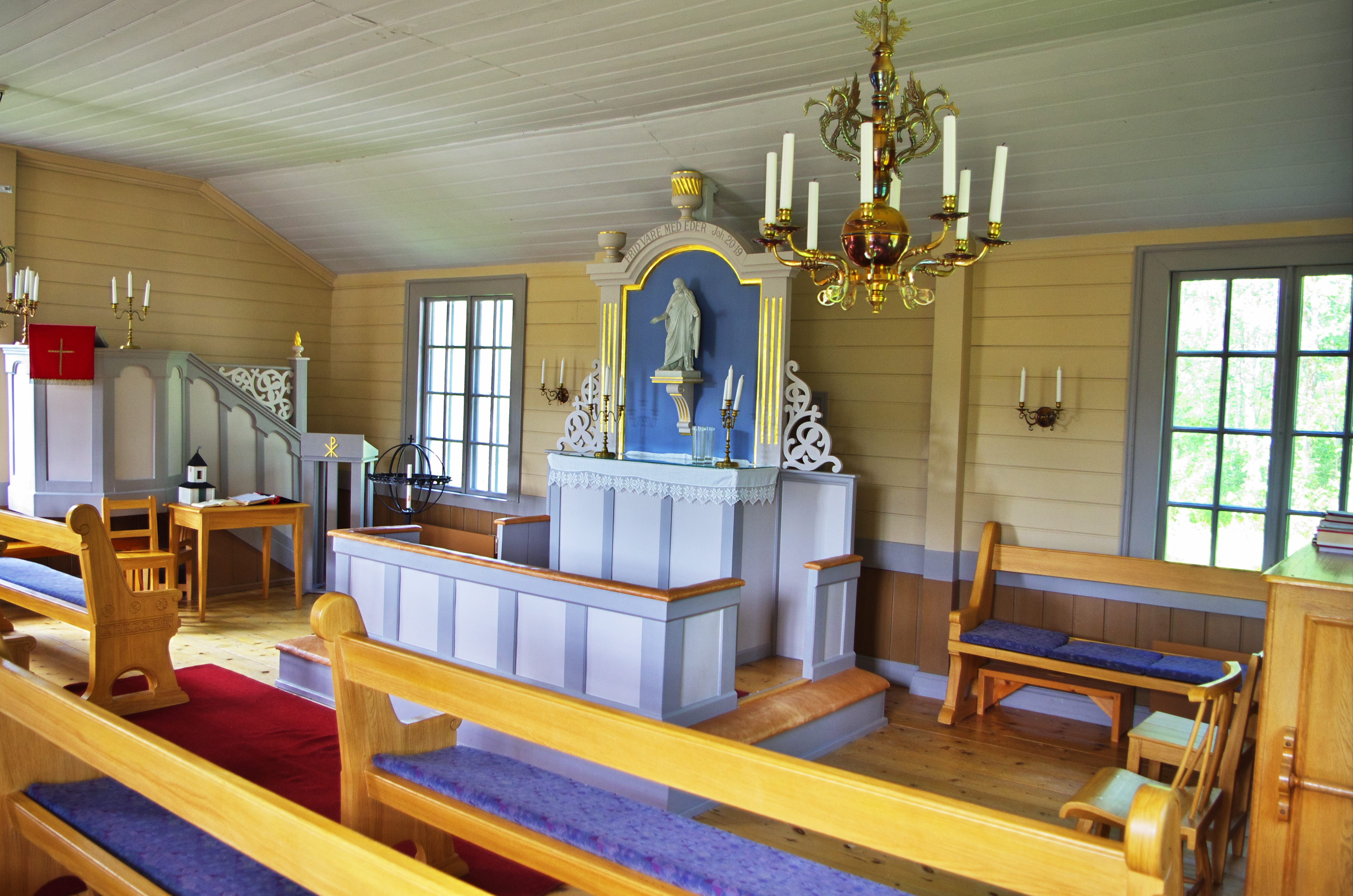 Jäkkviks kapell i Jäkkvik i Arjeplogs kommun i Lappland i Sverige. Kapellet uppfördes år 1777 på Lövmokk, en landtunga söder om kapellforsen. Kapellet flyttades till sin nuvarande plats i Jäkkvik år 1885.